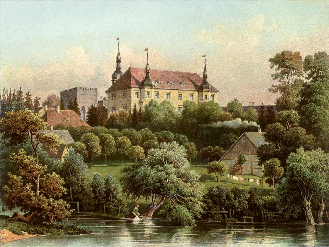 Schloss Klitschdorf, Lithographie von Alexander Duncker, 1869